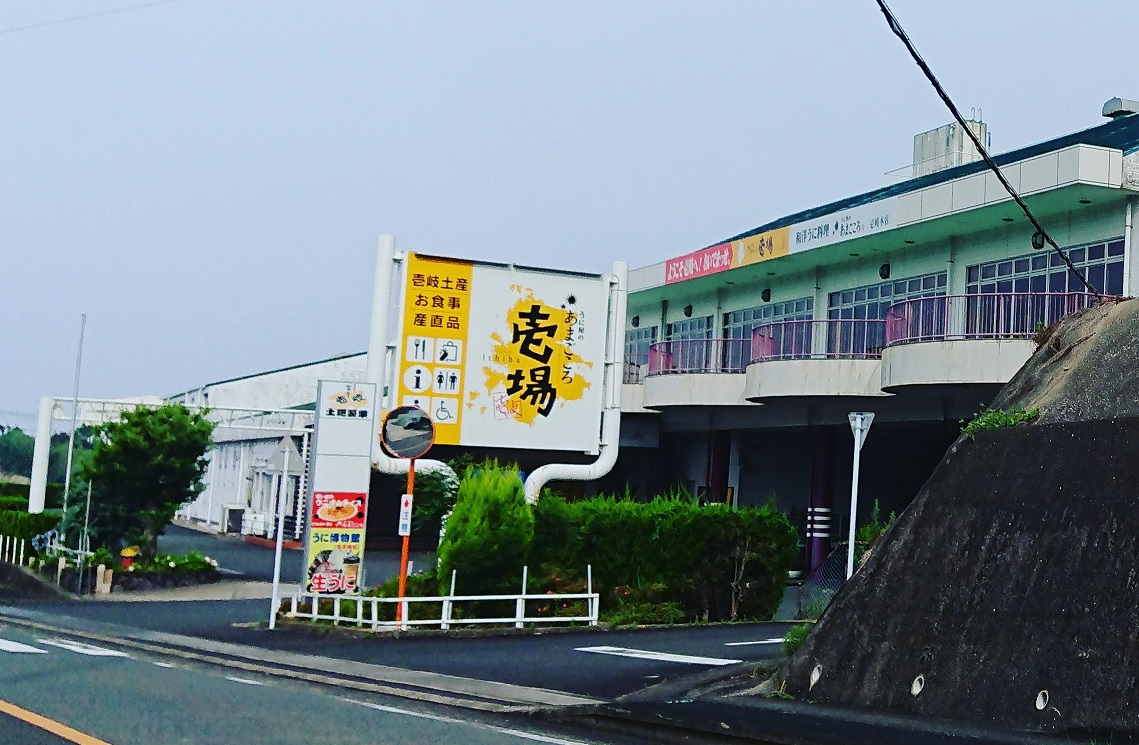 あまごころ本舗株式会社によって長崎県壱岐市で運営されていた大型土産店兼レストラン。2020年（令和2年）5月末をもって閉店となった。